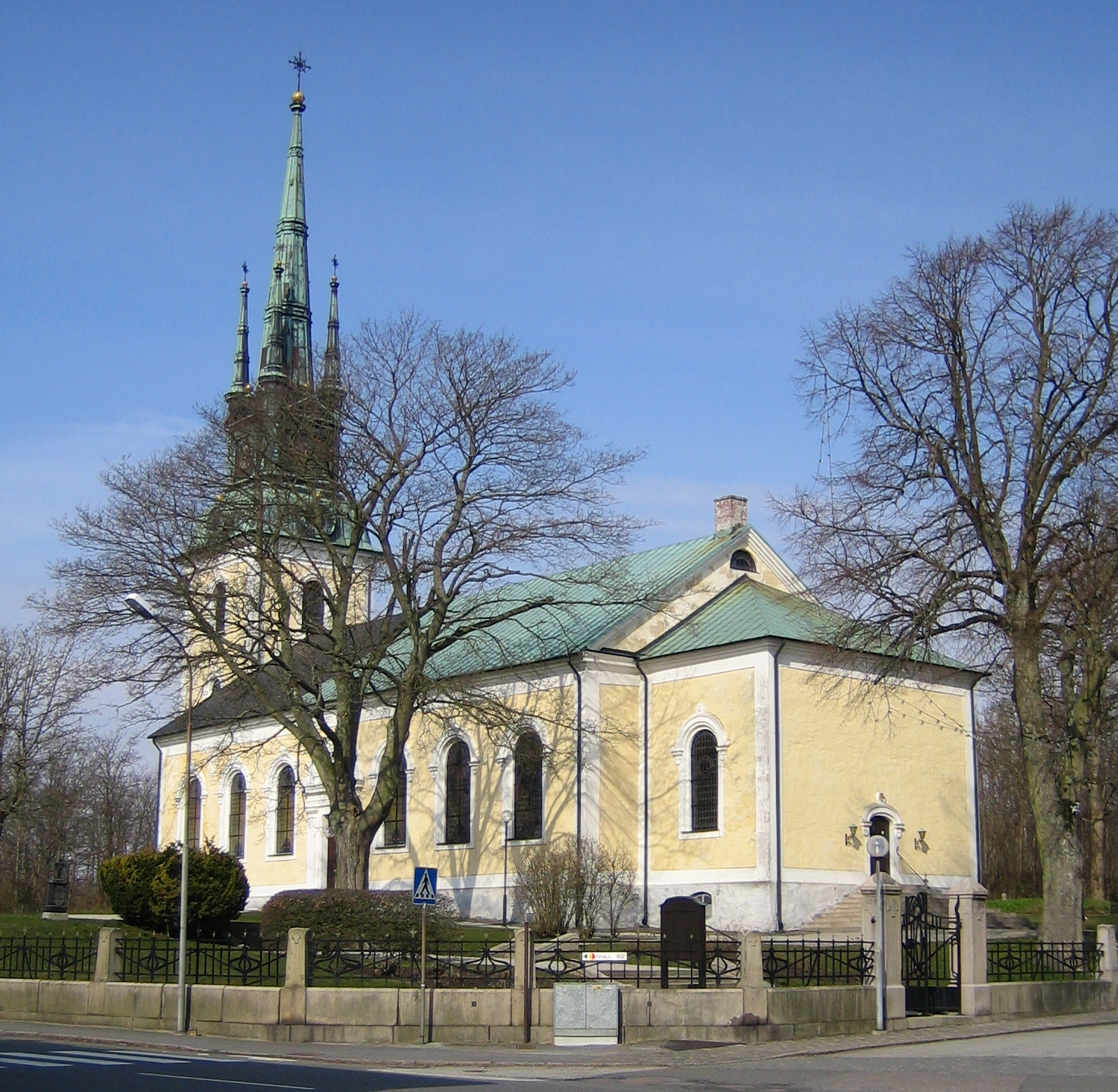 Borrby kyrka in Skåne, Sweden